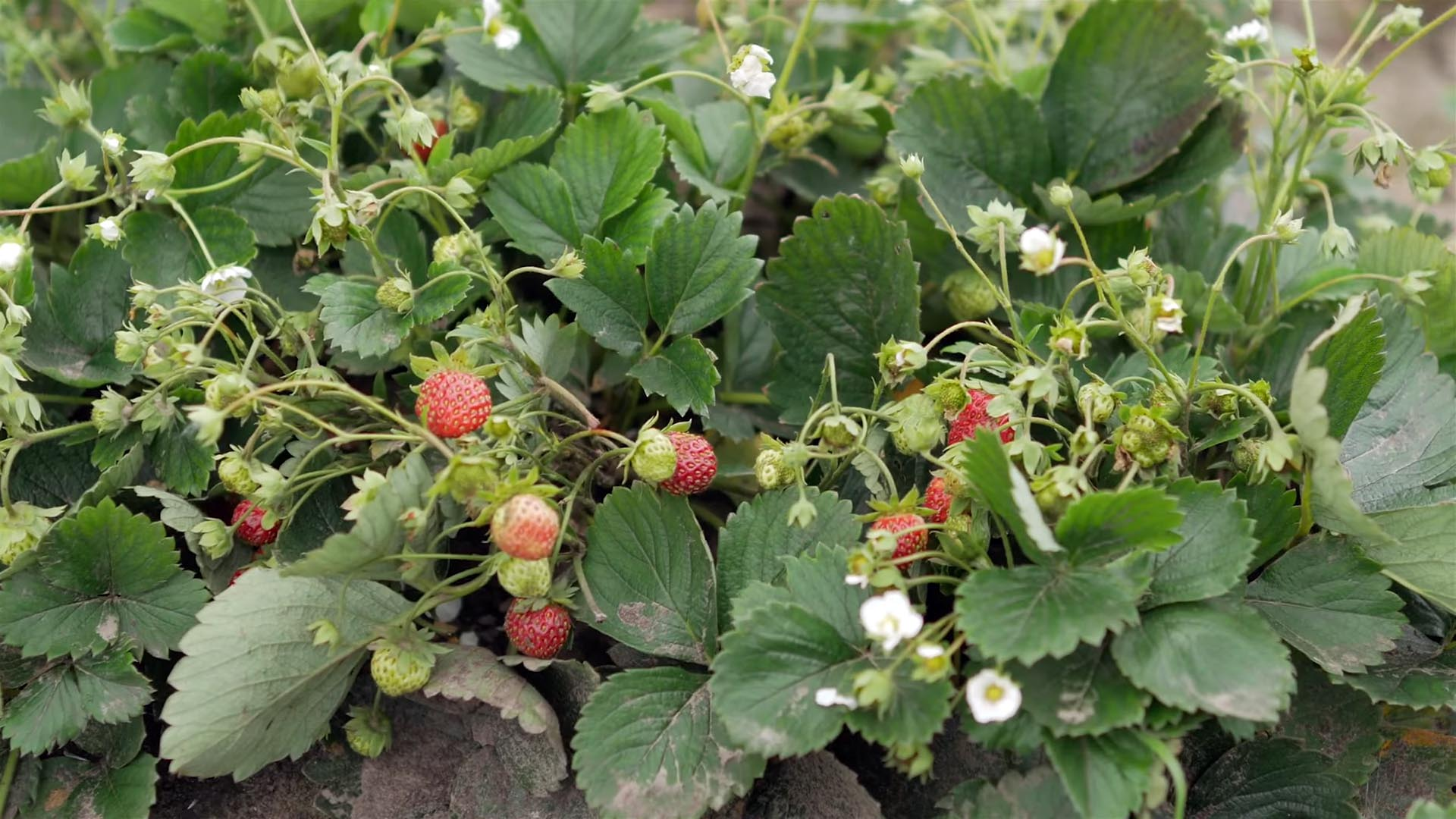 Ремонтантная земляника Сорт - "Любава"